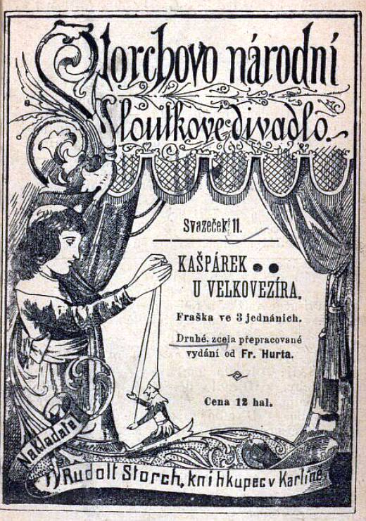 František Ruth (dramatik) alias Fr. Hurtː Kašpárek u velkovezíra. Fraška ve 3 jednáních. Obálka knížky. R. Storch, Praha